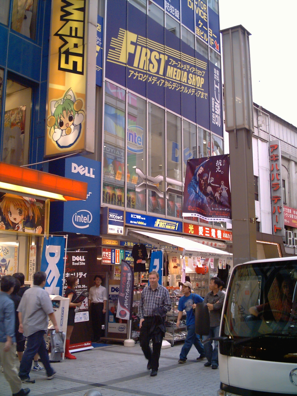 Akihabara, Japan